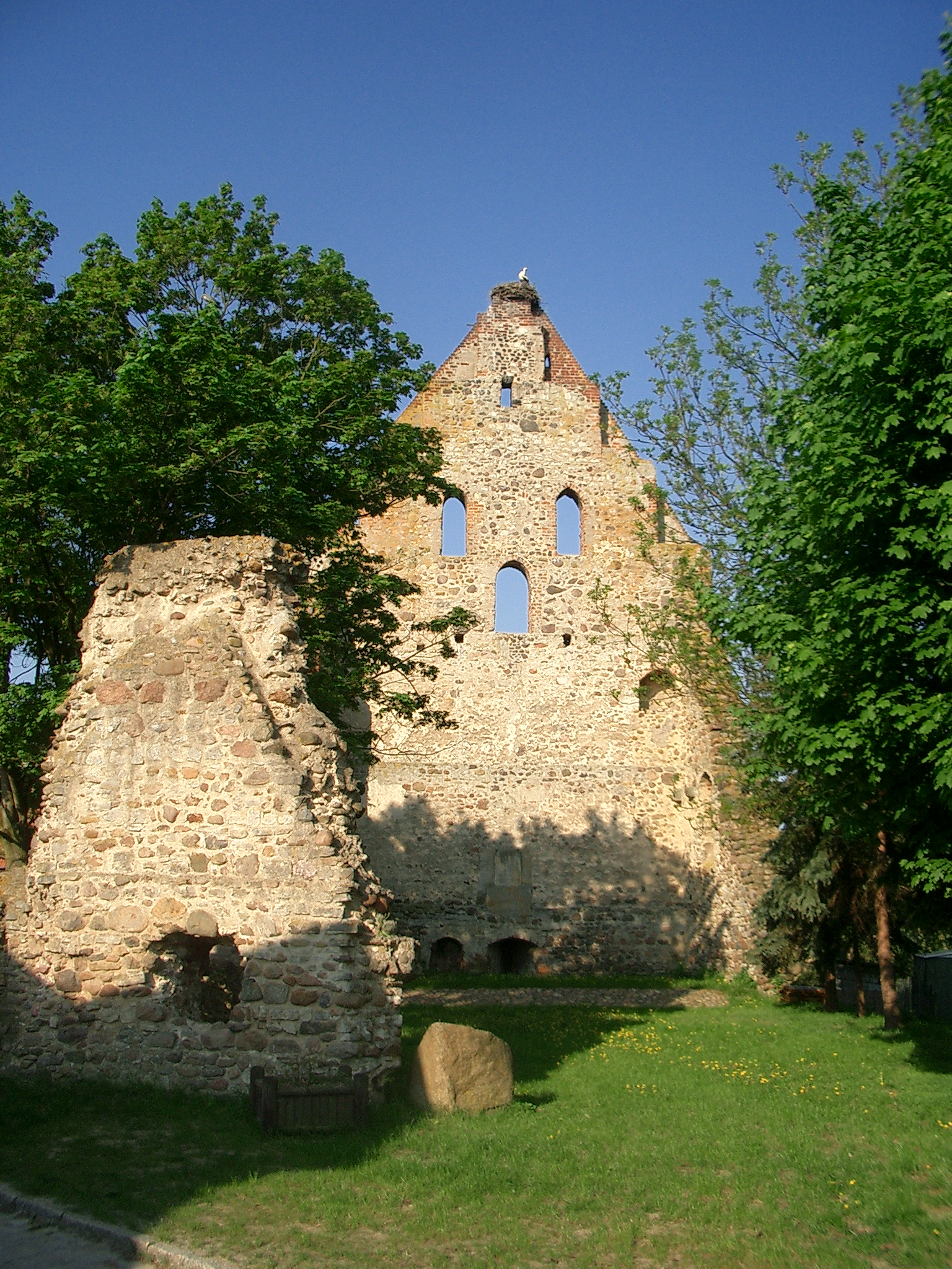 Ruine der Burganlage in Kalbe